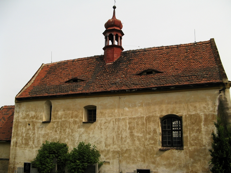 Kostel sv. Havla (Hrobčice), nad vsí, Hrobčice